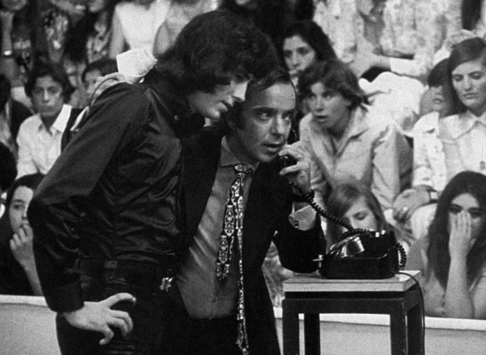 Joan Manuel Serrat junto al presentador de televisión argentino Pipo Mancera, en su programa "Sábados Circulares"